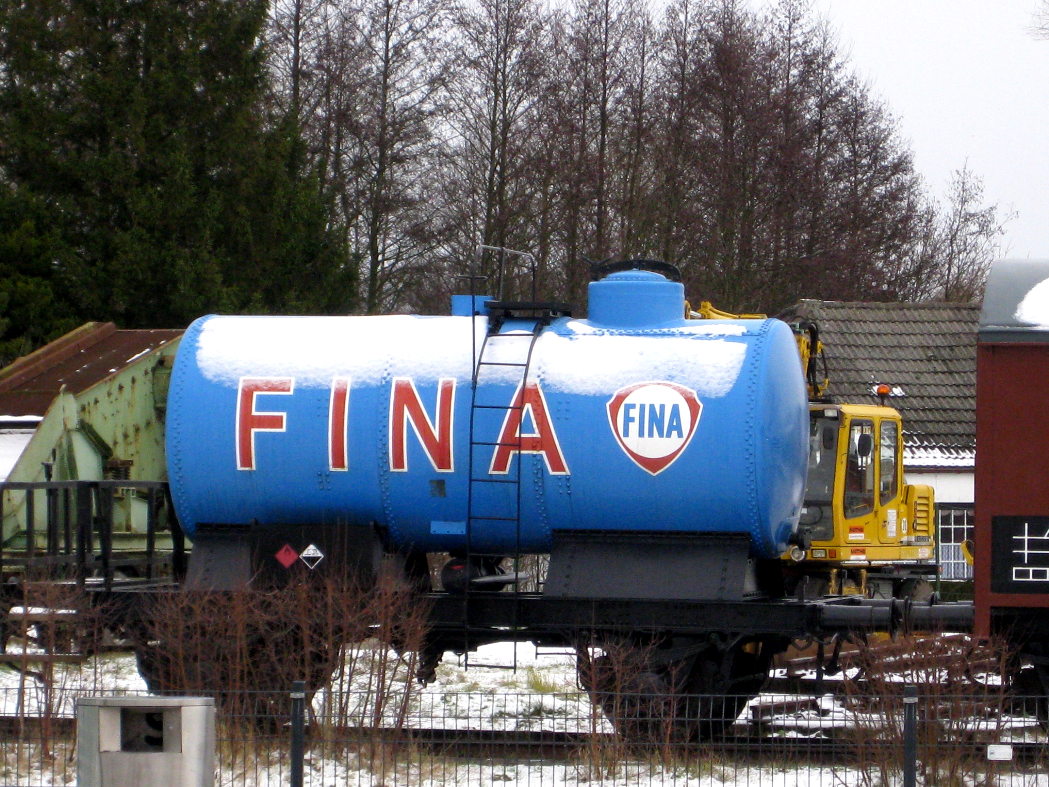 FINA-Kesselwaggon der Museumseisenbahn Küstenbahn Ostfriesland mit genietetem Kessel